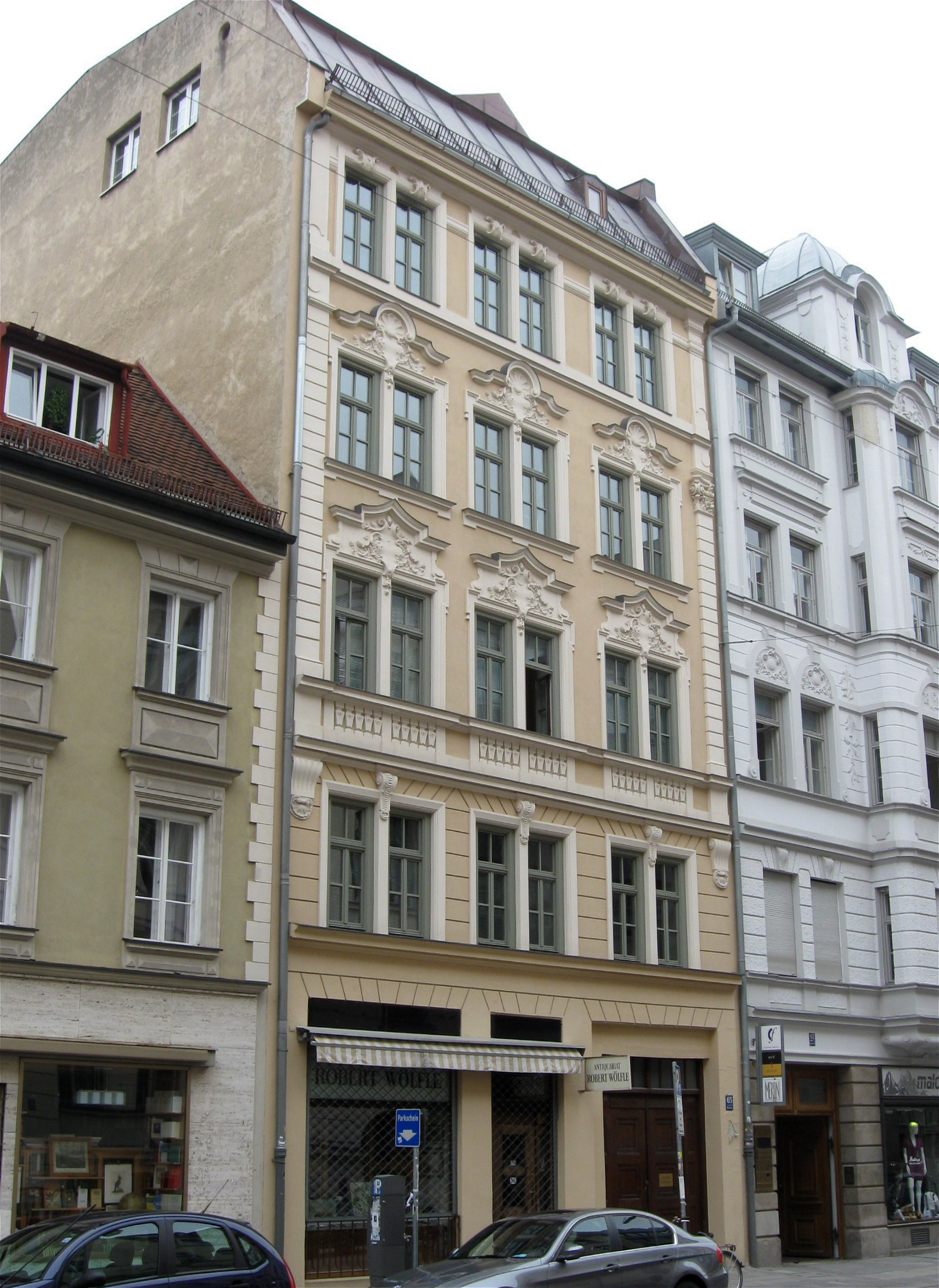 Amalienstraße 65; Mietshaus, neubarock, reich stuckiert, Ende 19. Jh.